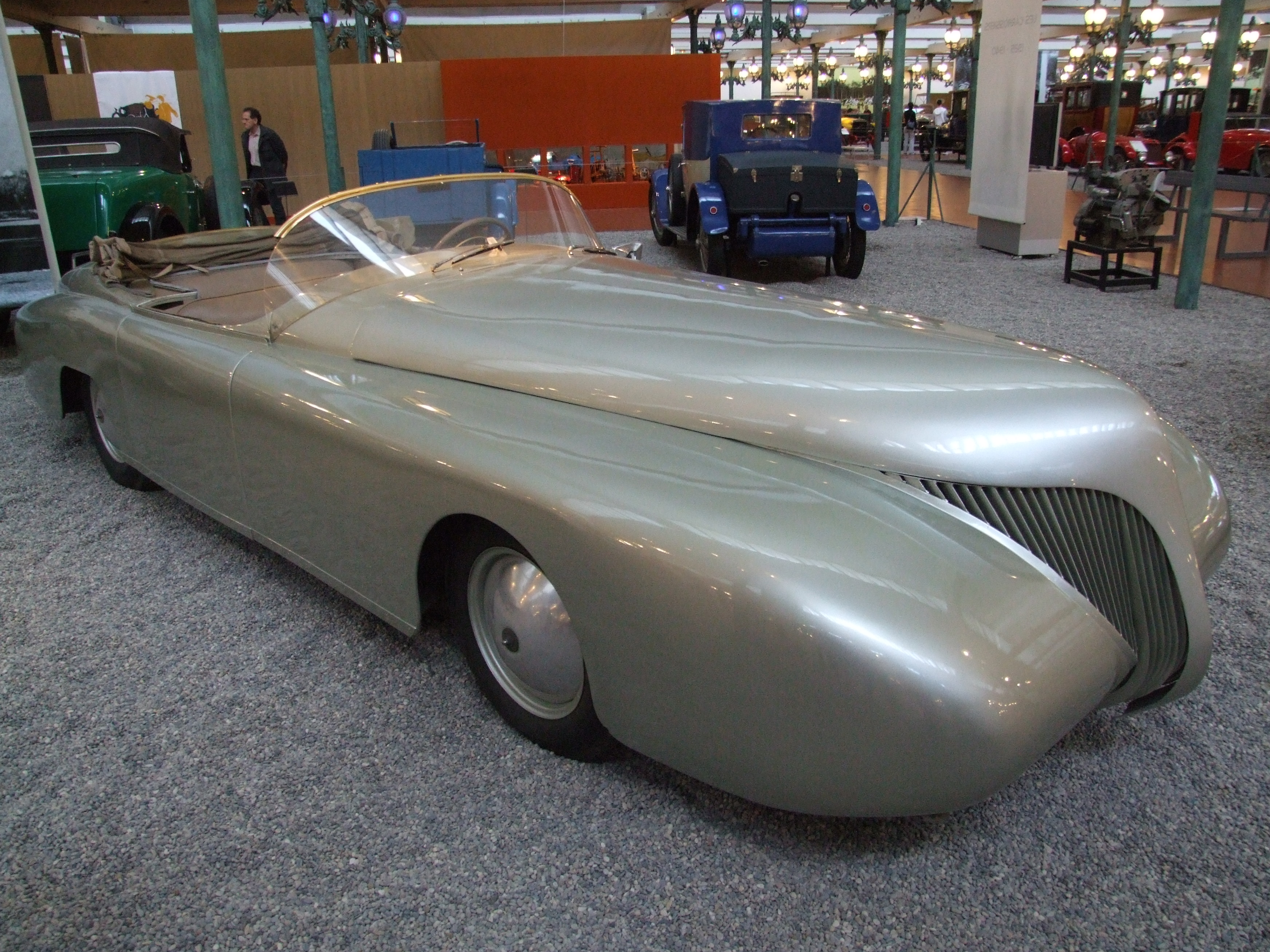 Pauls Arzens Conceptcar La Baleine, Cité de l’Automobile – Musée National – Collection Schlumpf, Mülhausen, Frankreich